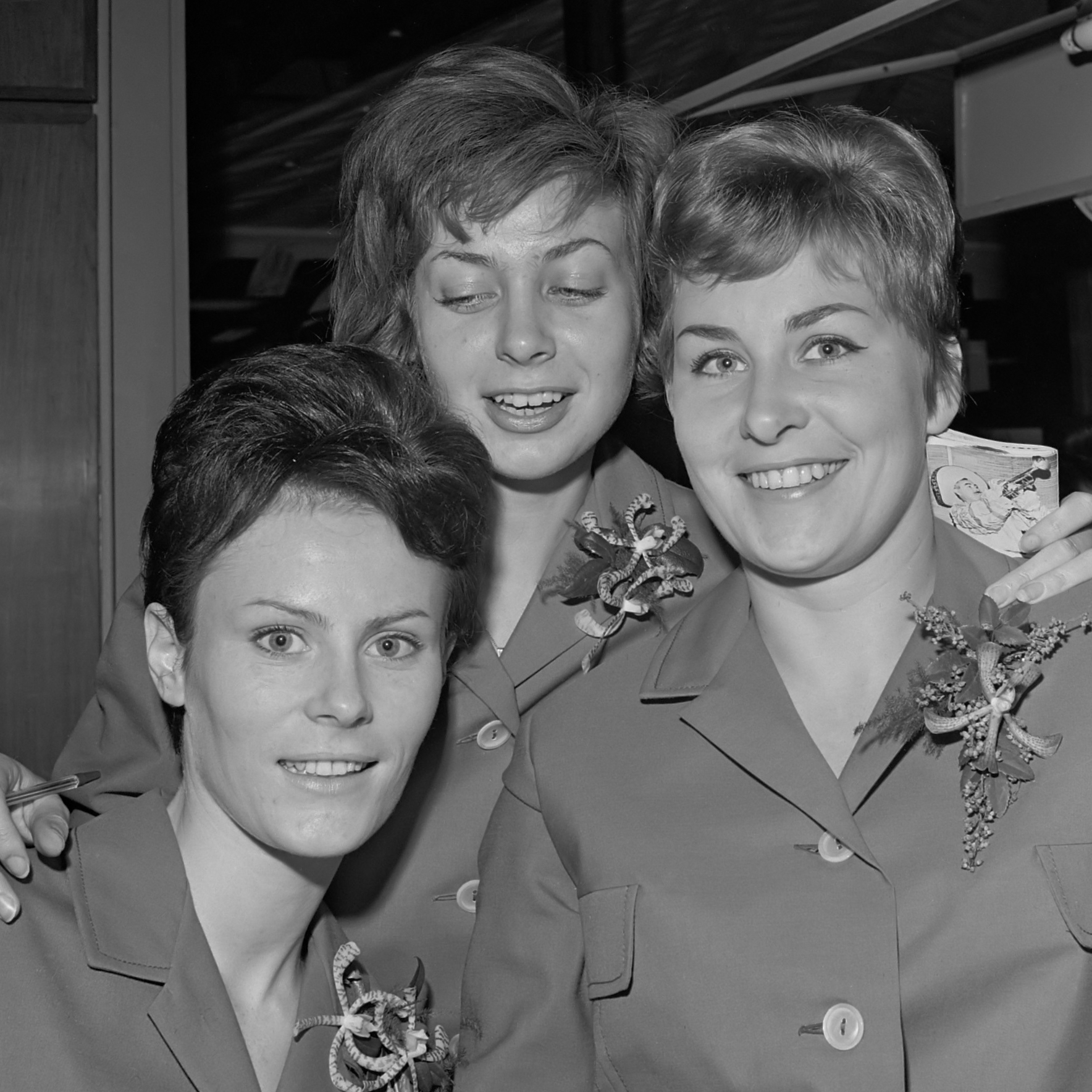 Platenmarkt in Bijenkorf te Rotterdam. Zanggroep The Spotlights 9 oktober 1963